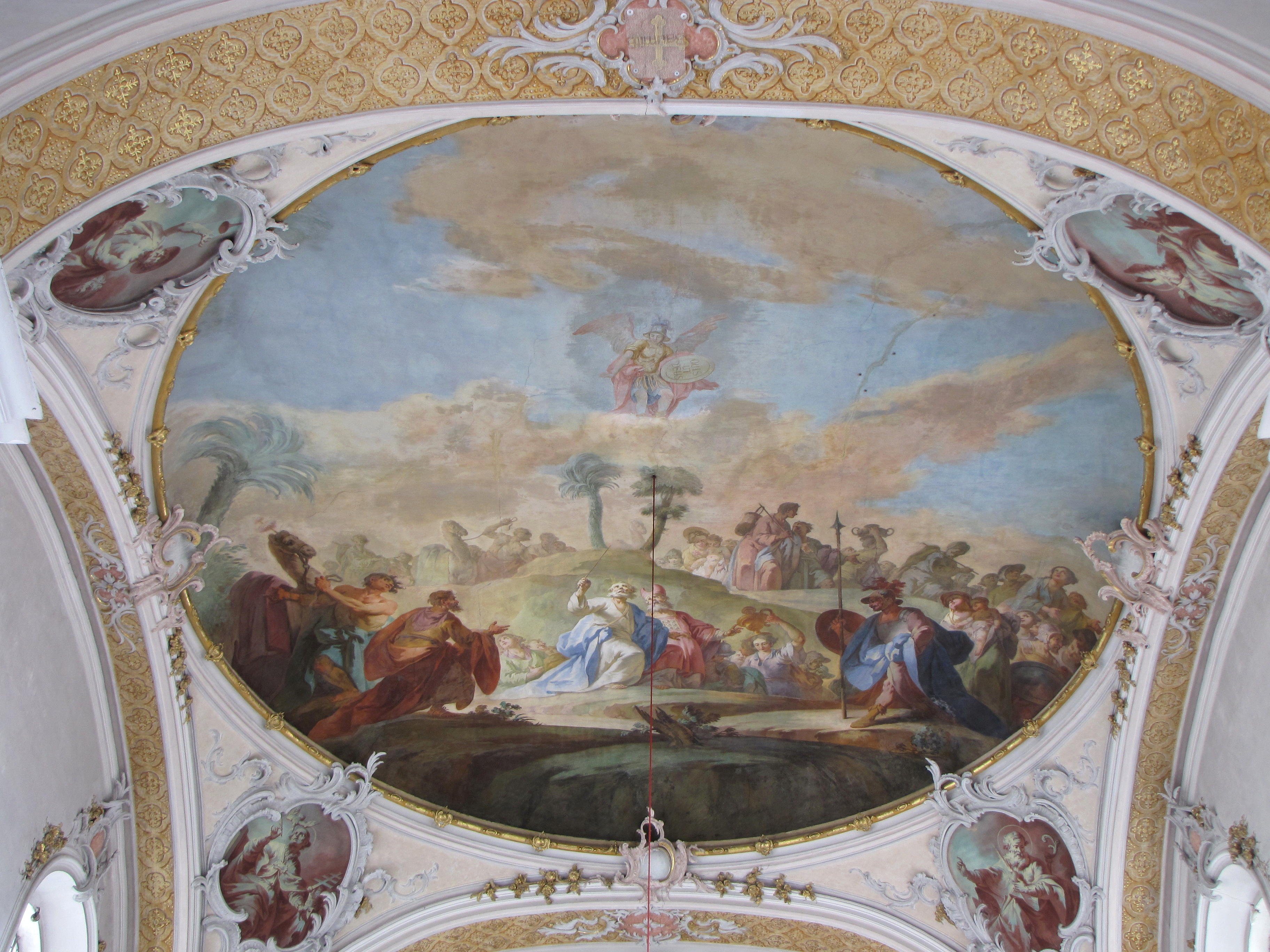 Wunderbare Führung des Volkes Israel durch die Wüste, Deckengemälde in der Flachkuppel des Chores in der Pfarrkirche Denklingen